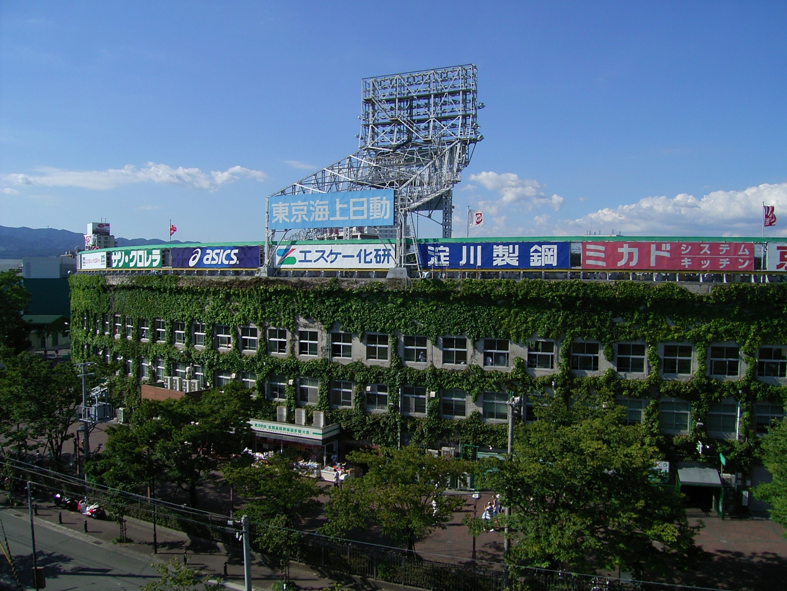 Hanshin Koshien Stadium